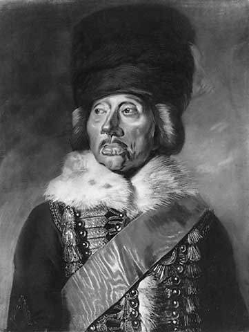 Zieten, Hans Joachim von; preuß.Reitergeneral; Wustrau bei Ruppin 24.5.1699-Berlin 27.1.1786.-Porträt.-Pastell, zeitgenössisch, von Edward Francis Cunningham (1741/42-1793). 78 x 62 cm. Wustrau, Graf Zieten-Schwerinsche Landgutstiftung